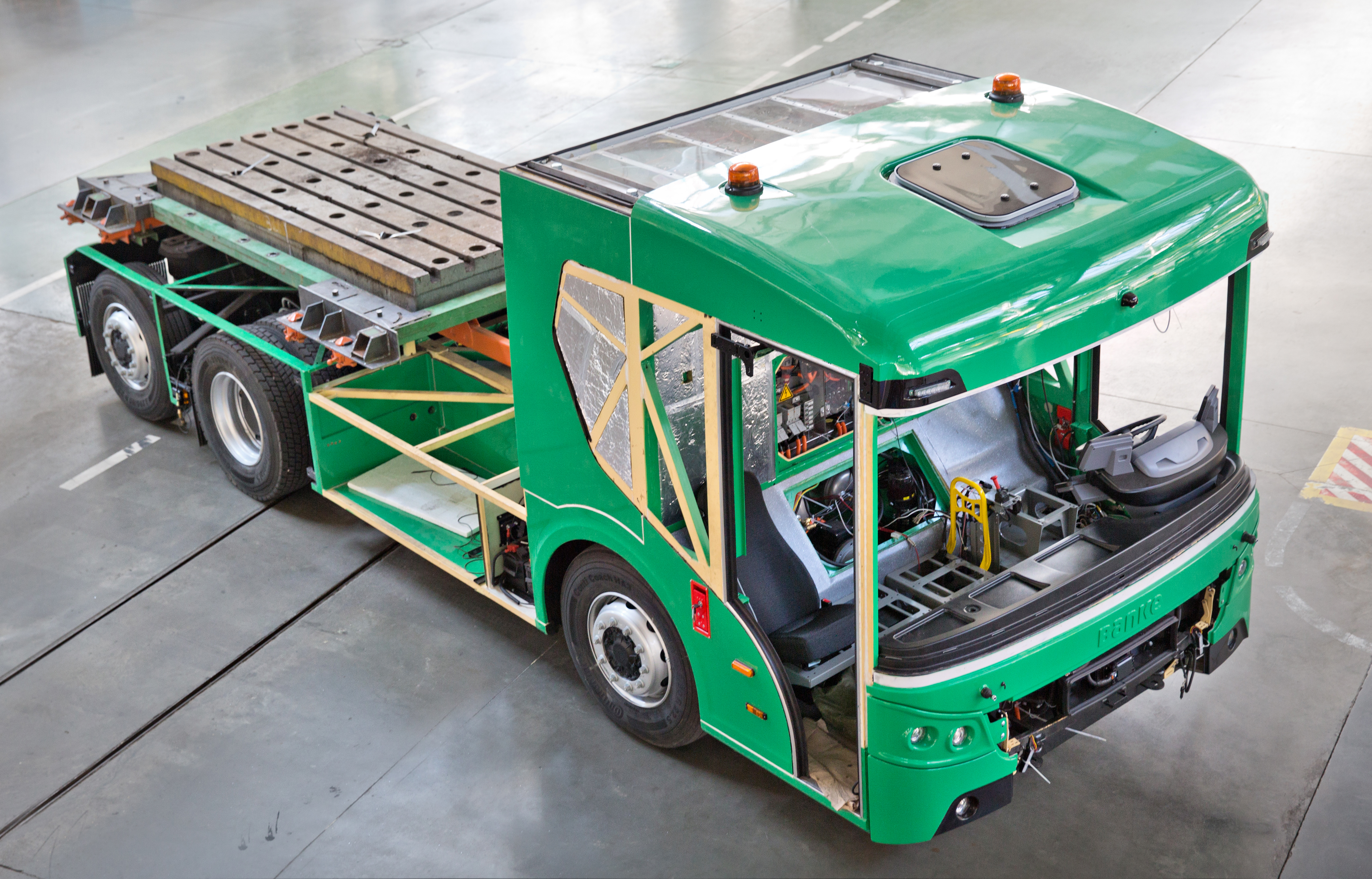 ERCV27